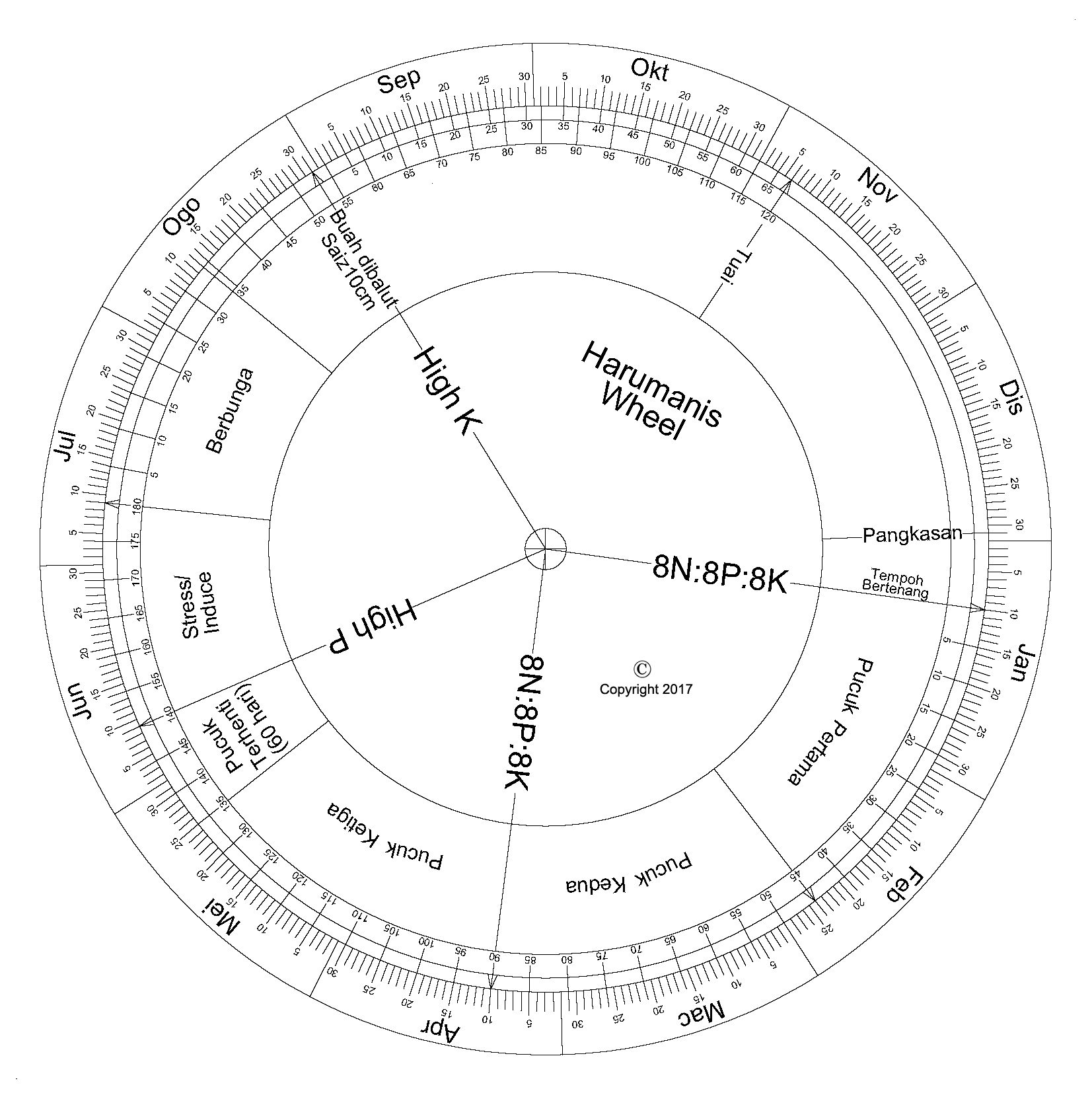 Roda Kitaran Harumnis